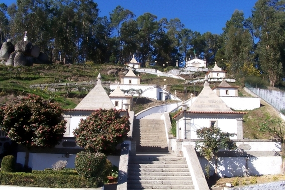 Calvário